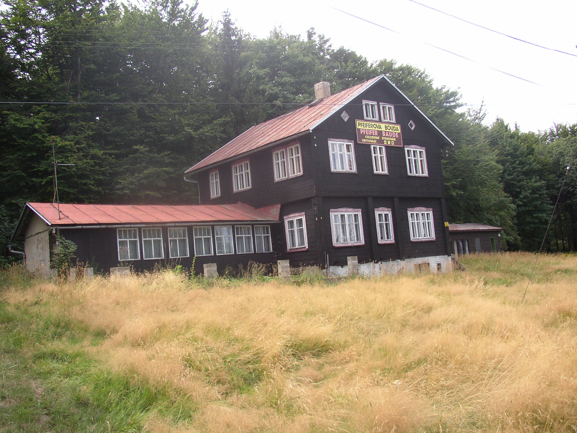 Pfeiferova bouda,osada Jedlová ,Jiřetín pod Jedlovou, okres Děčín Česká republika